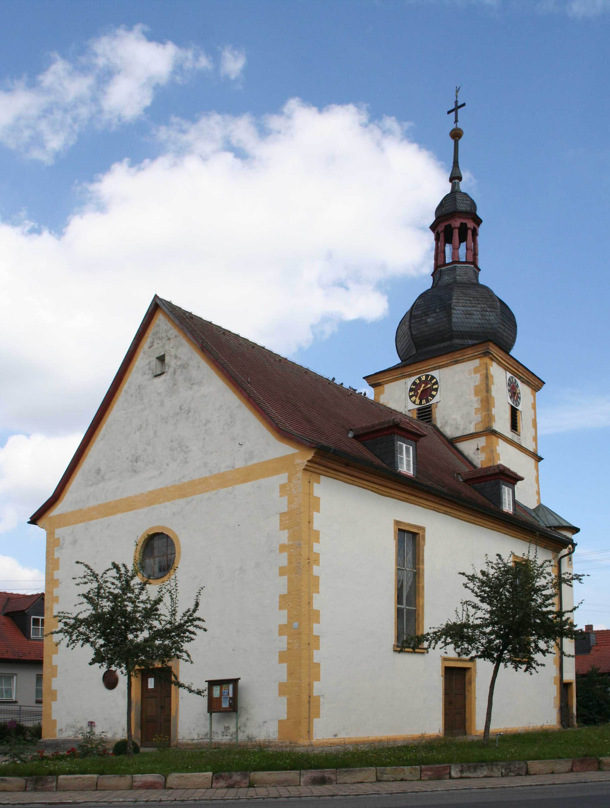 Ev. Kirche in Sulzdorf an der Lederhecke im Landkreis Rhön-Grabfeld in Bayern